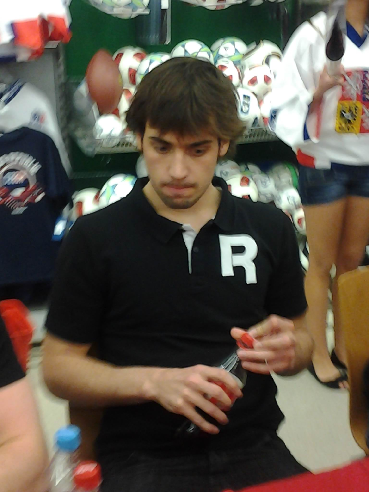 Jakub Svoboda na autogramiádě České hokejové reprezentace Brno 25.4.2012